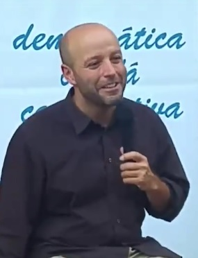 Luis Villares.